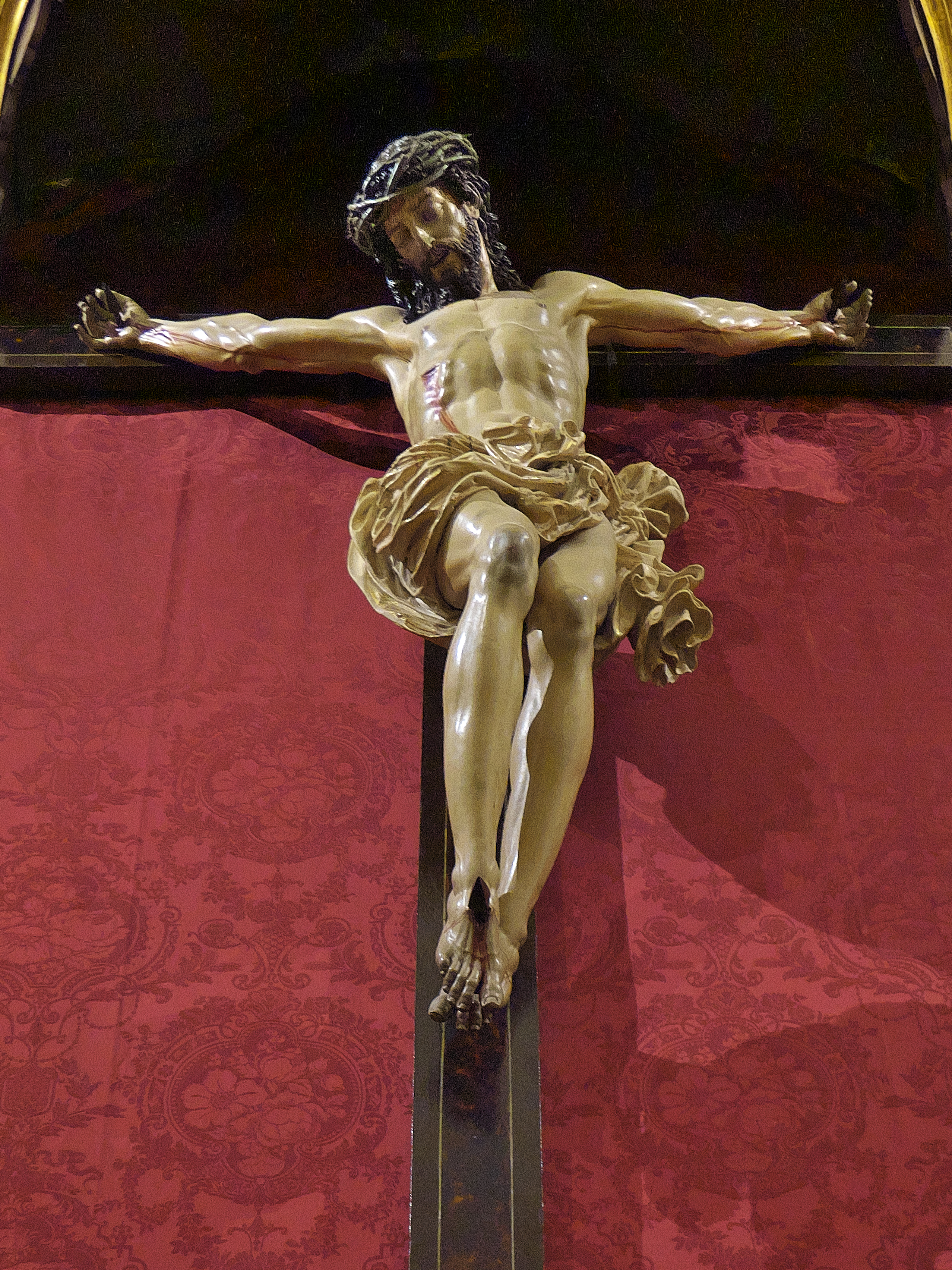 Una imagen que, por su indiscutible calidad, es llamada al debate en cuanto a su autoría, en la que se incluiría a Juan Martínez Montañes y a los Hermanos García.